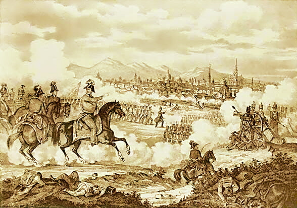 Battaglia di Milano (5-6 agosto 1848), litografia